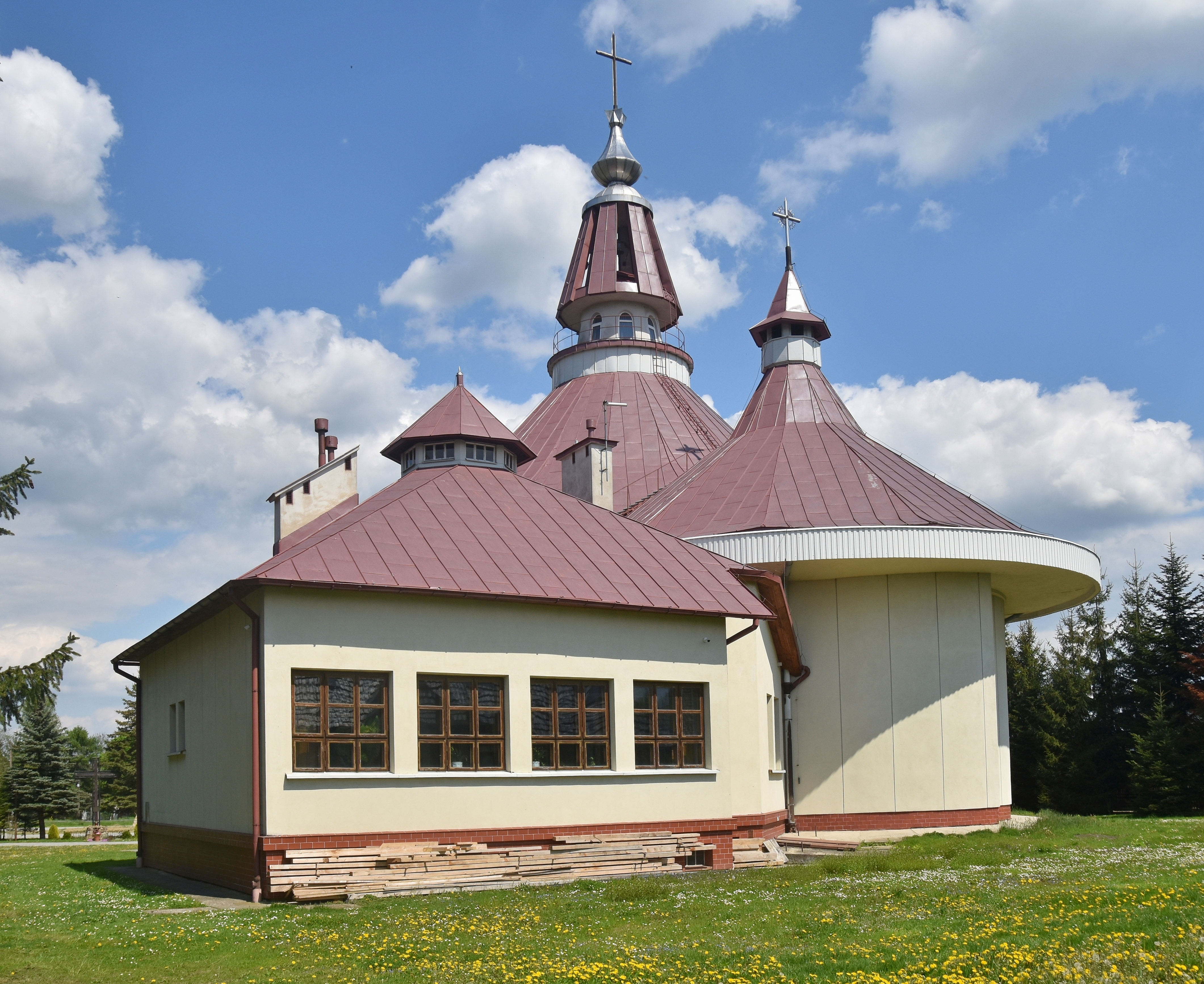 wieś Jaszczew